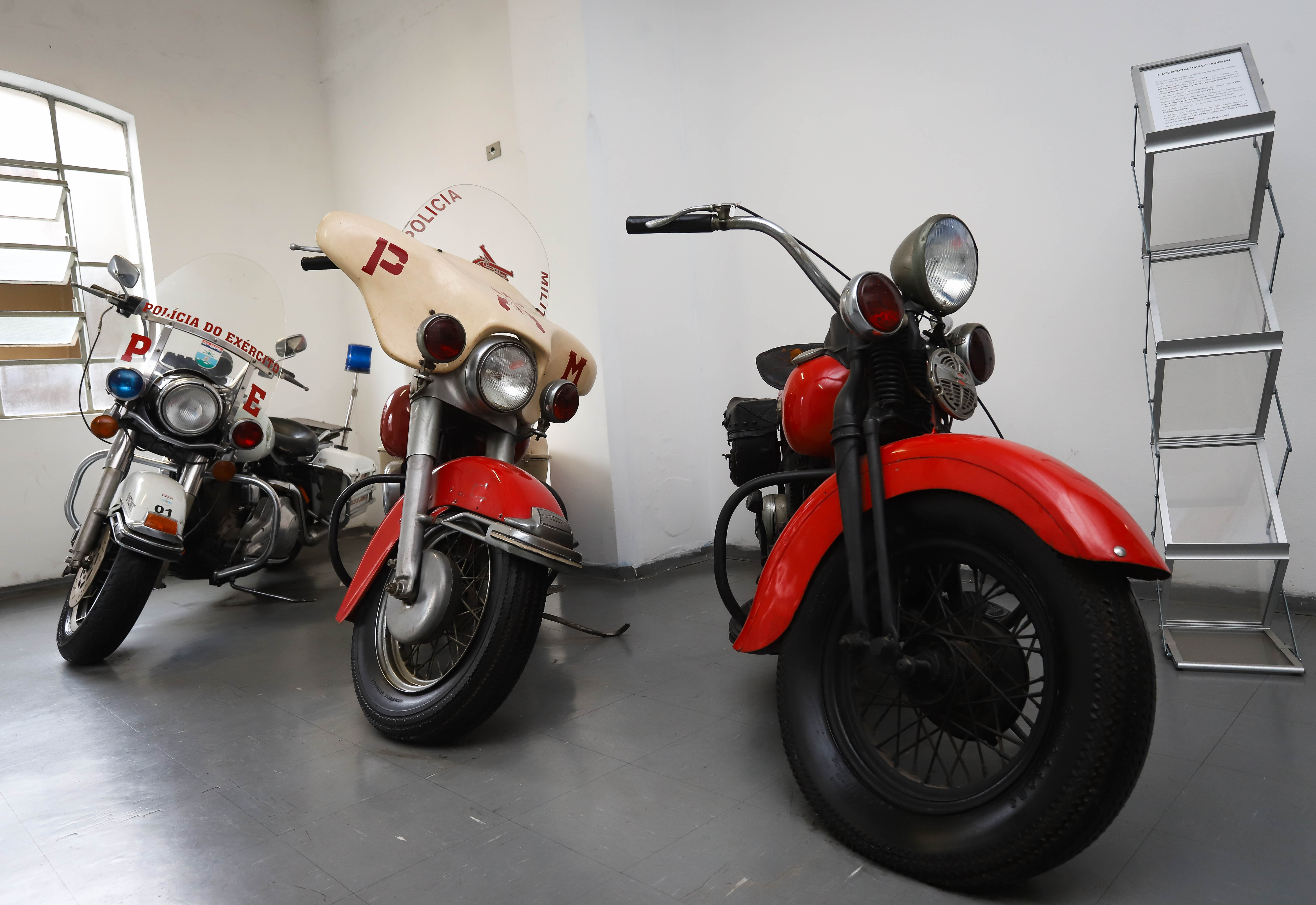 Museu da PM. Local: São Paulo/SP. Data: 16/05/2019. Foto: Governo do Estado de São Paulo